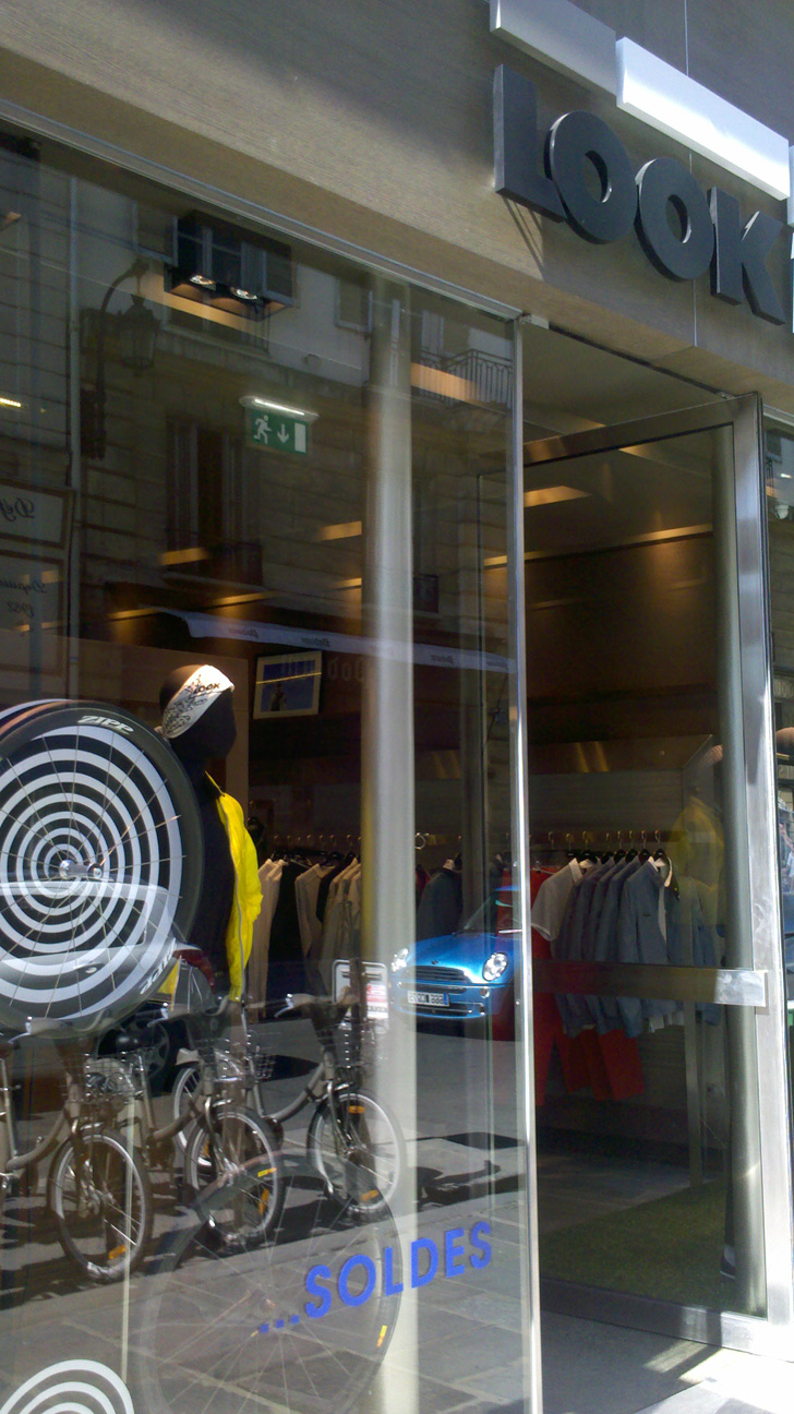 Boutique Look Collection à Paris, rue Saint-Honoré